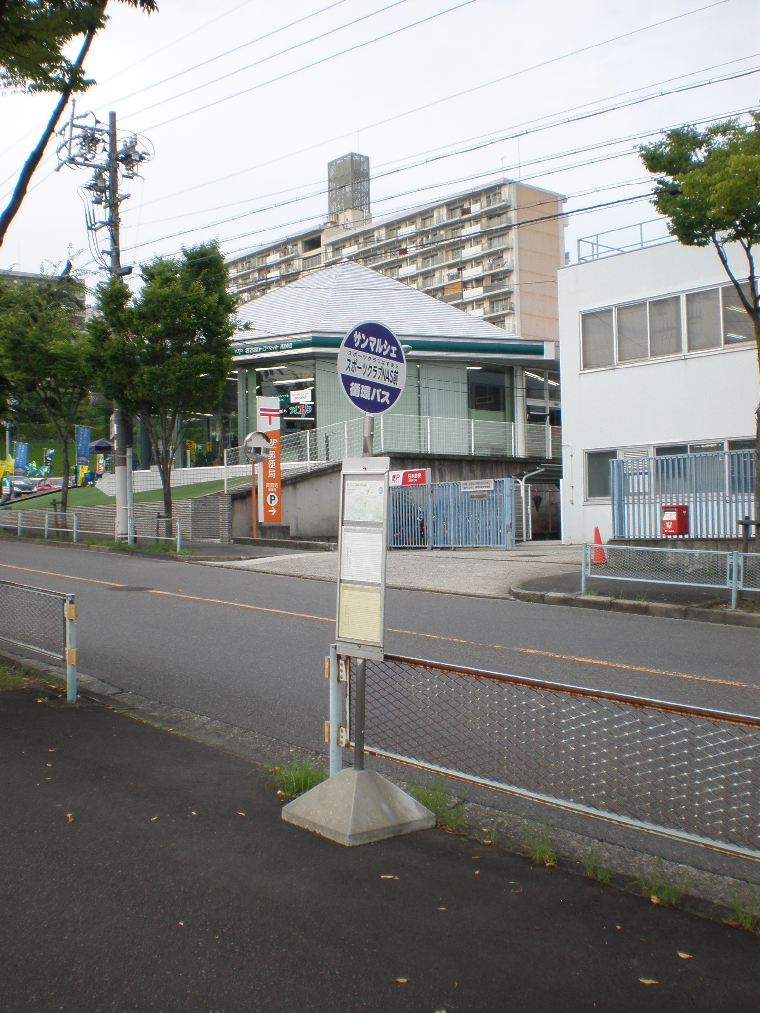 愛知県春日井市にあるサンマルシェ巡回バス・スポーツクラブNAS前停留所